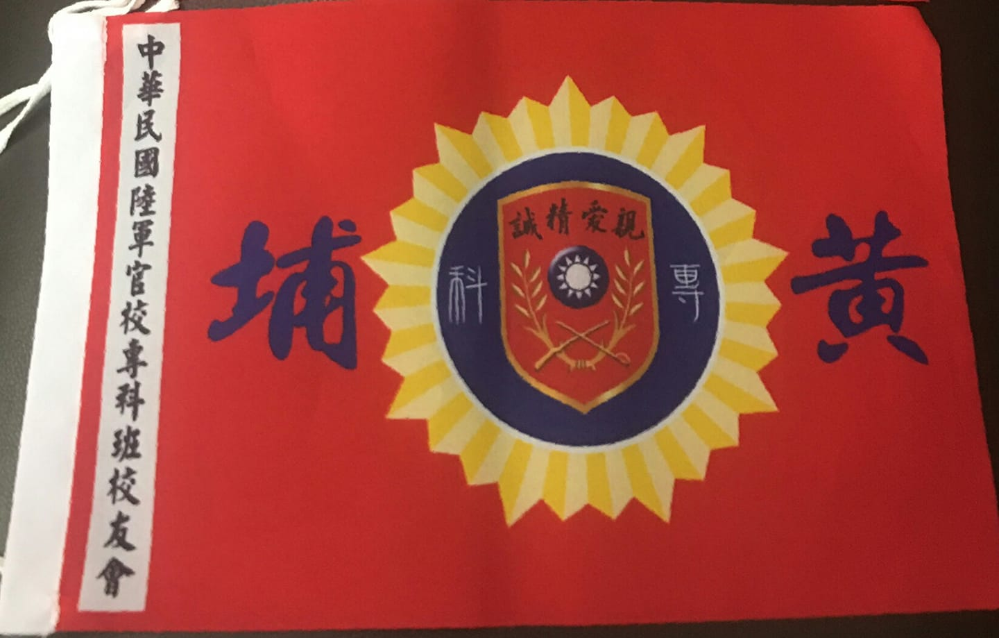 拍攝~陸軍官校專科班校友會-會旗~(新式:加 黃埔 二字，親愛精誠-由右至左)